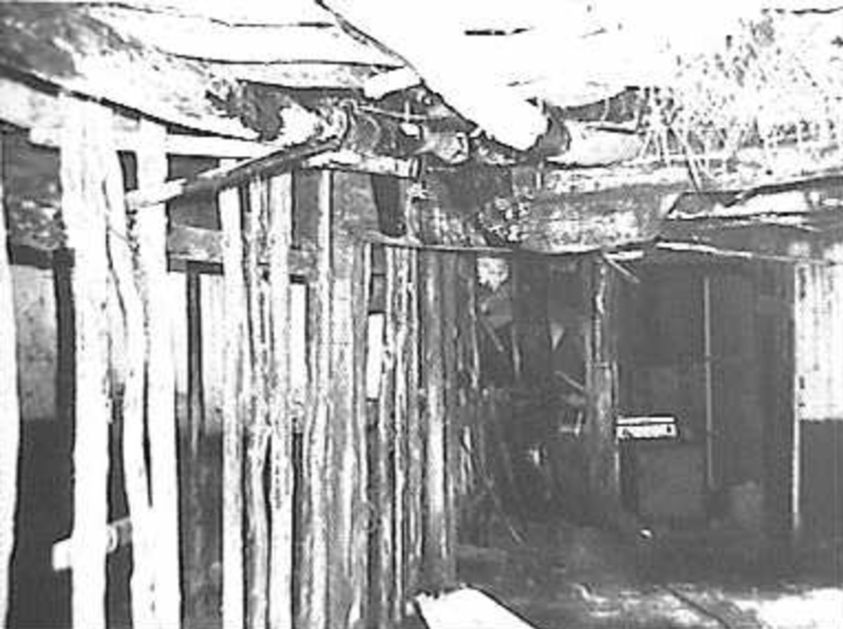 Zuidelijke en oostelijke zandgronden/ Rundveestalinterieur: stalpalen (opmerking: Deze afbeelding hebben wij helaas alleen in deze lage resolutie.)